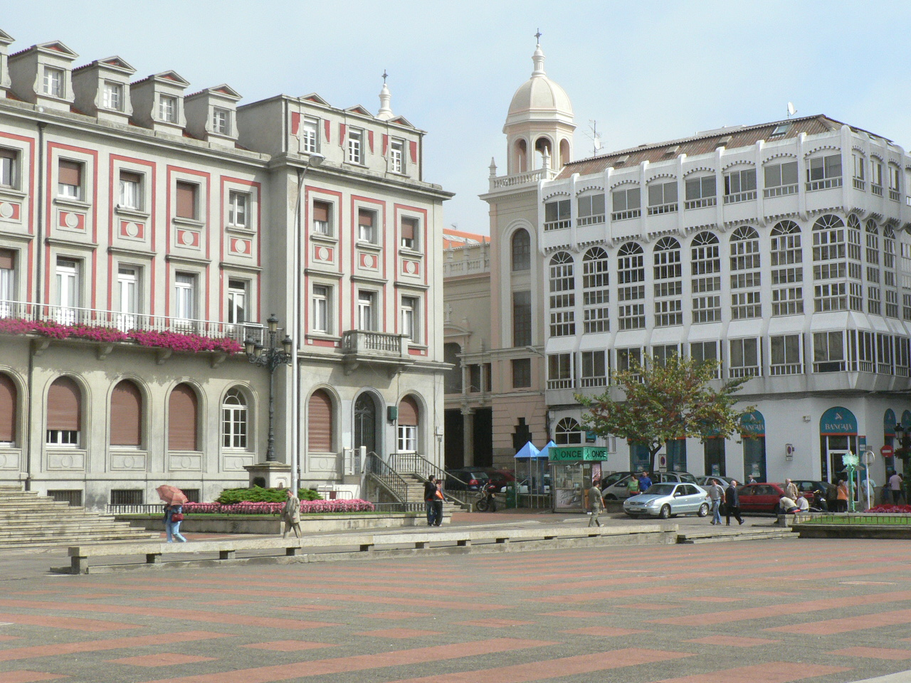 Praza de Armas en Ferrol